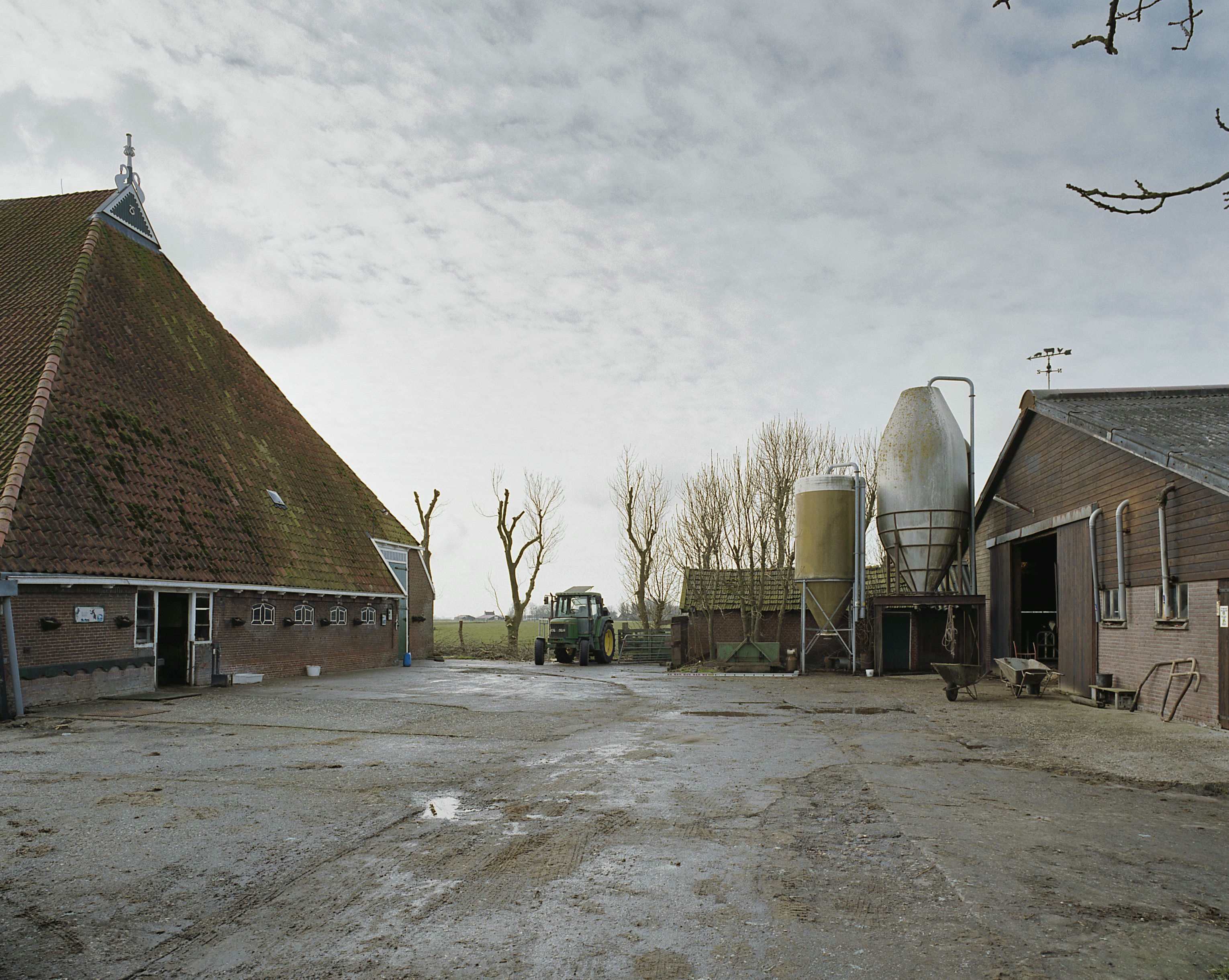 Boerderij De Scheltingastate: Overzicht met links de boerderij, rechts de stal en in het midden het koetshuis (achter twee silo's)